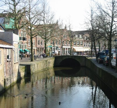 Oudewater stadsgezicht foto gemaakt en aangeboden voor vrij gebruik door gebruiker:Ellywa